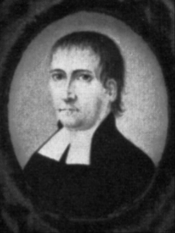 Bildnisminiatur des Pfarrers Johann Jakob Gradmann, ca. 1807; Ravensburg, Stadtarchiv